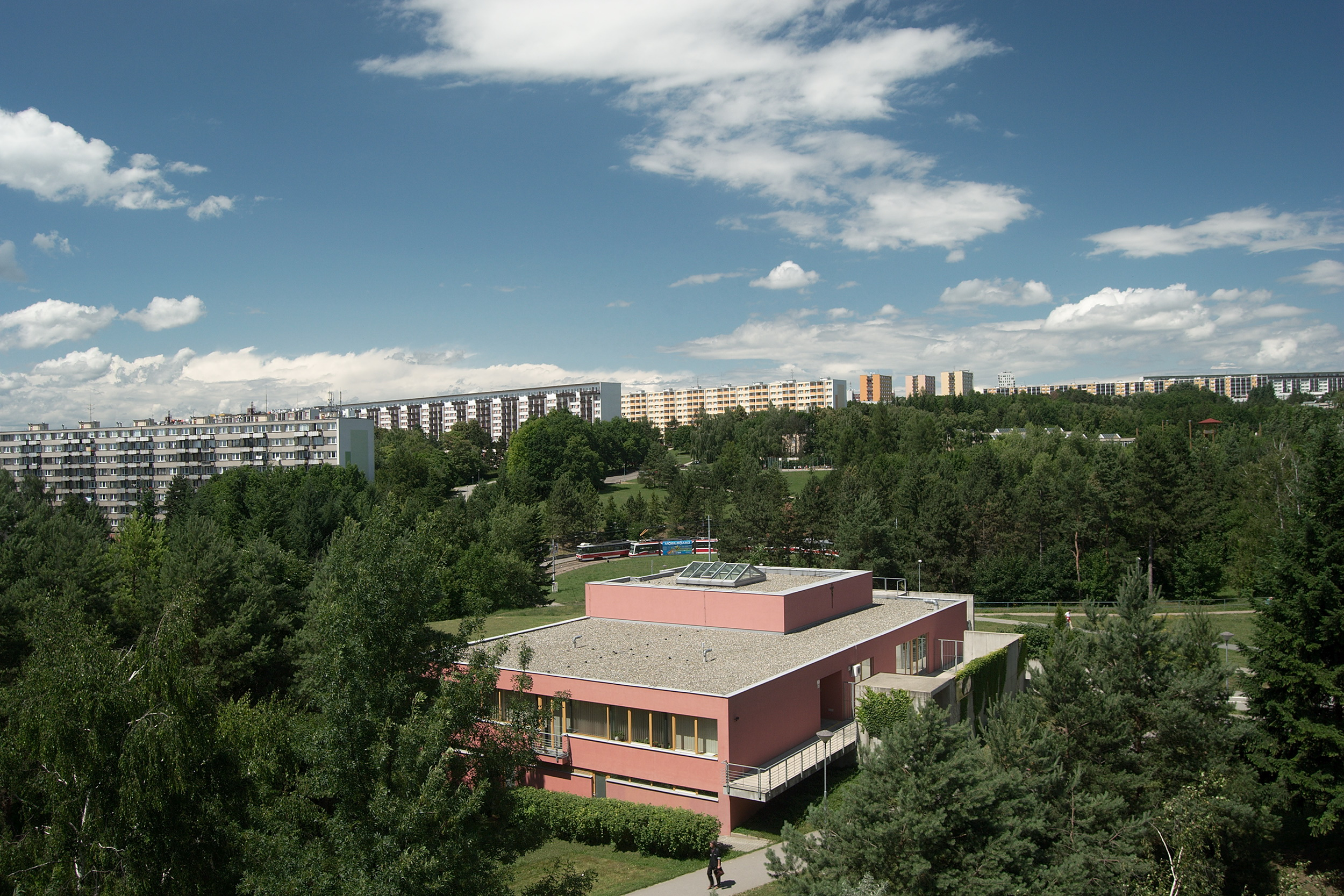 Brno-Lesná - výhled k severozápadu z domu Halasovo náměstí 4